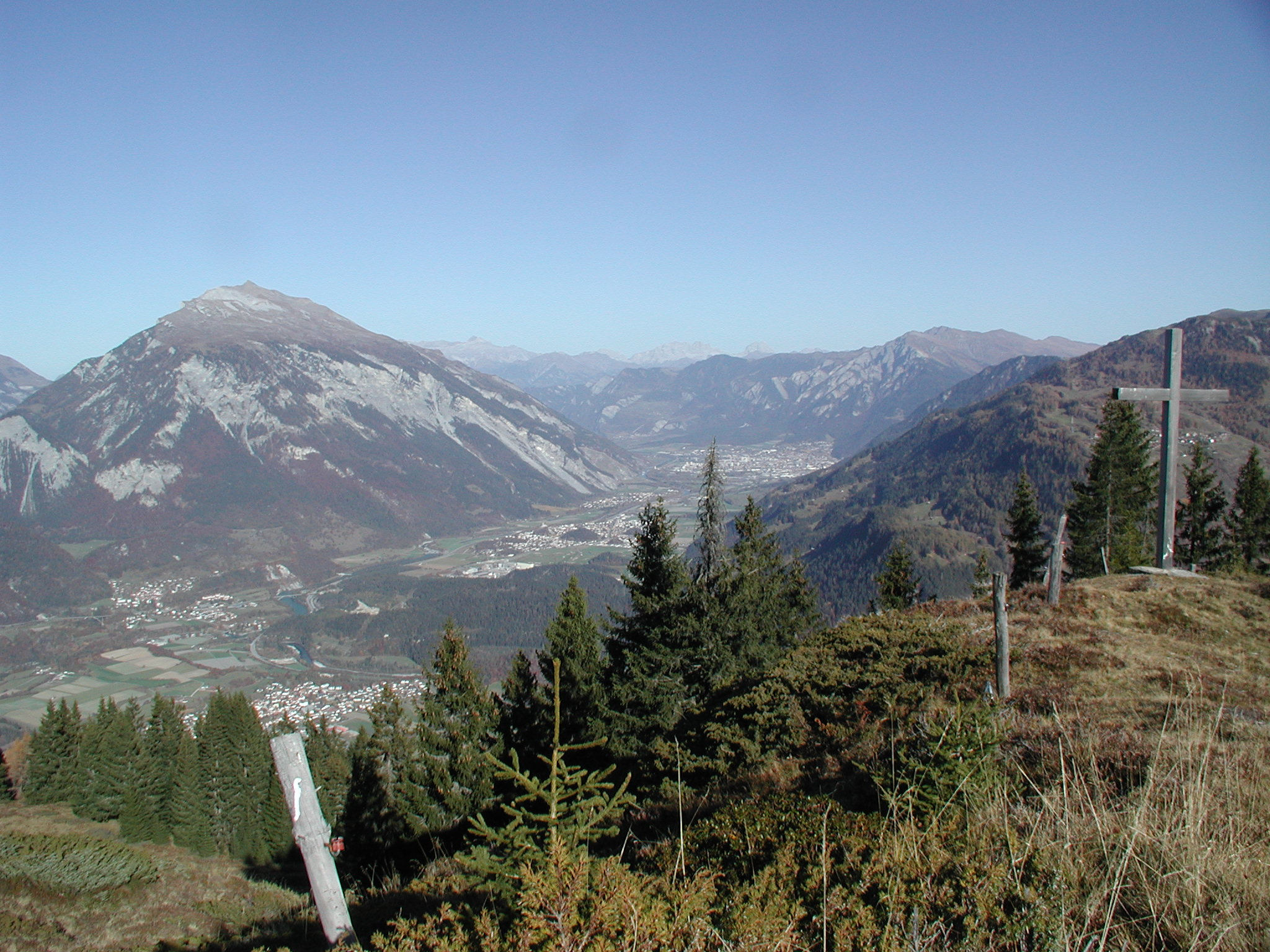 Blick vom Bot da la Crusch auf der Alp Sura bei Bonaduz in das obere Bündner Rheintal mit Calanda.